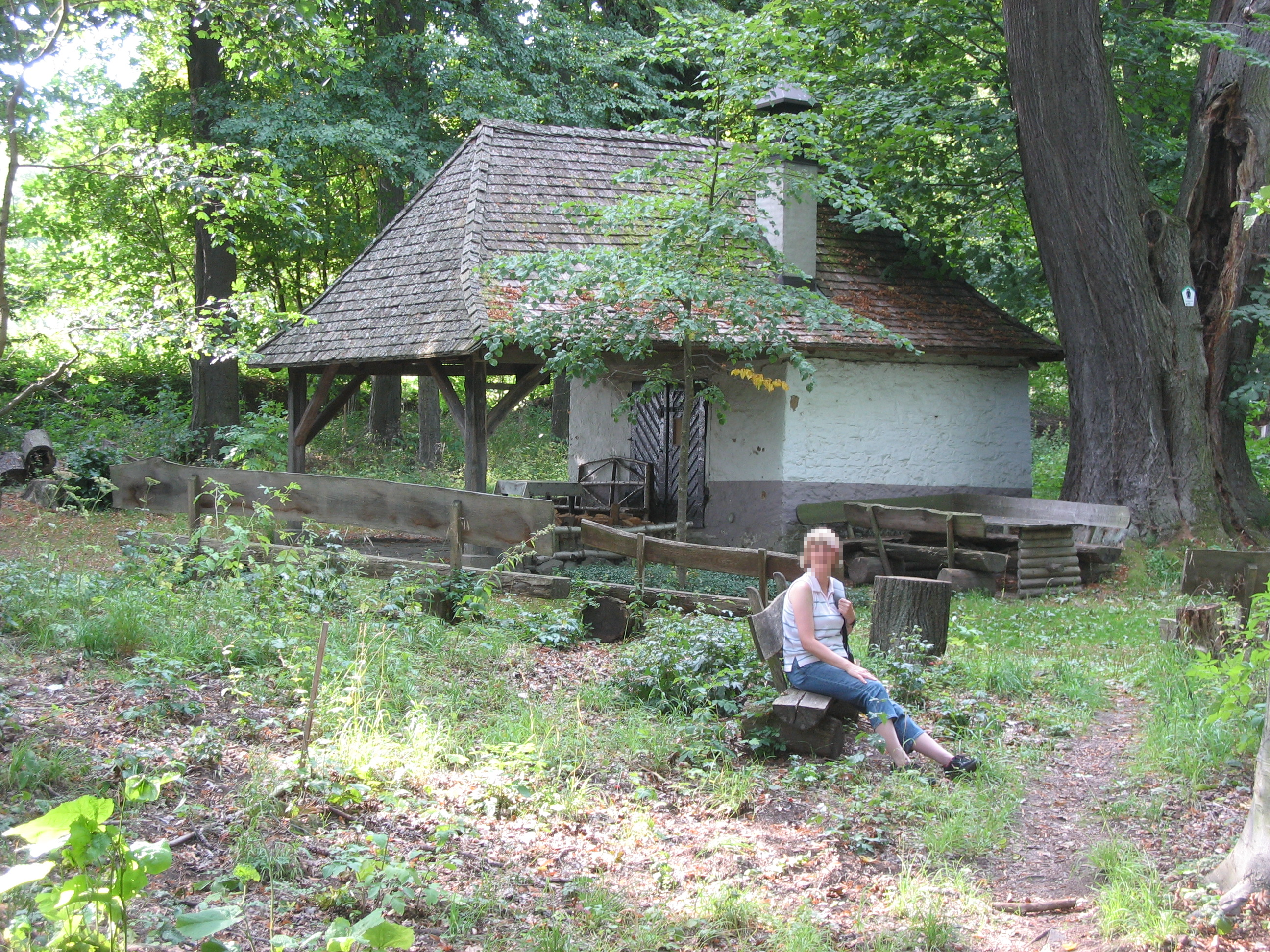 Klage- und Rügegericht zu Volkmannrode